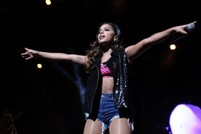 49 - Anitta (49)